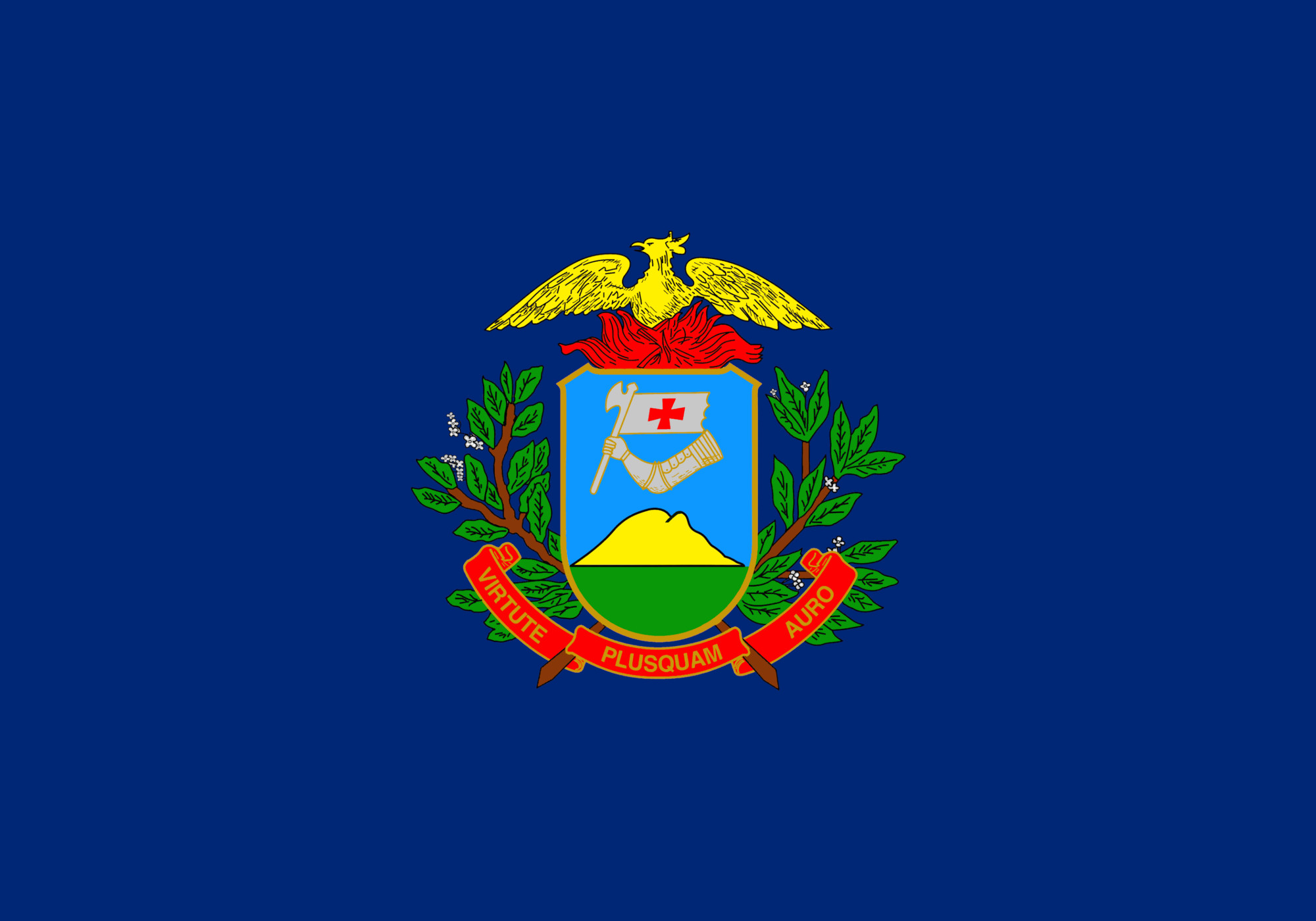 BAndeira do governador do estado do Mato Grosso.